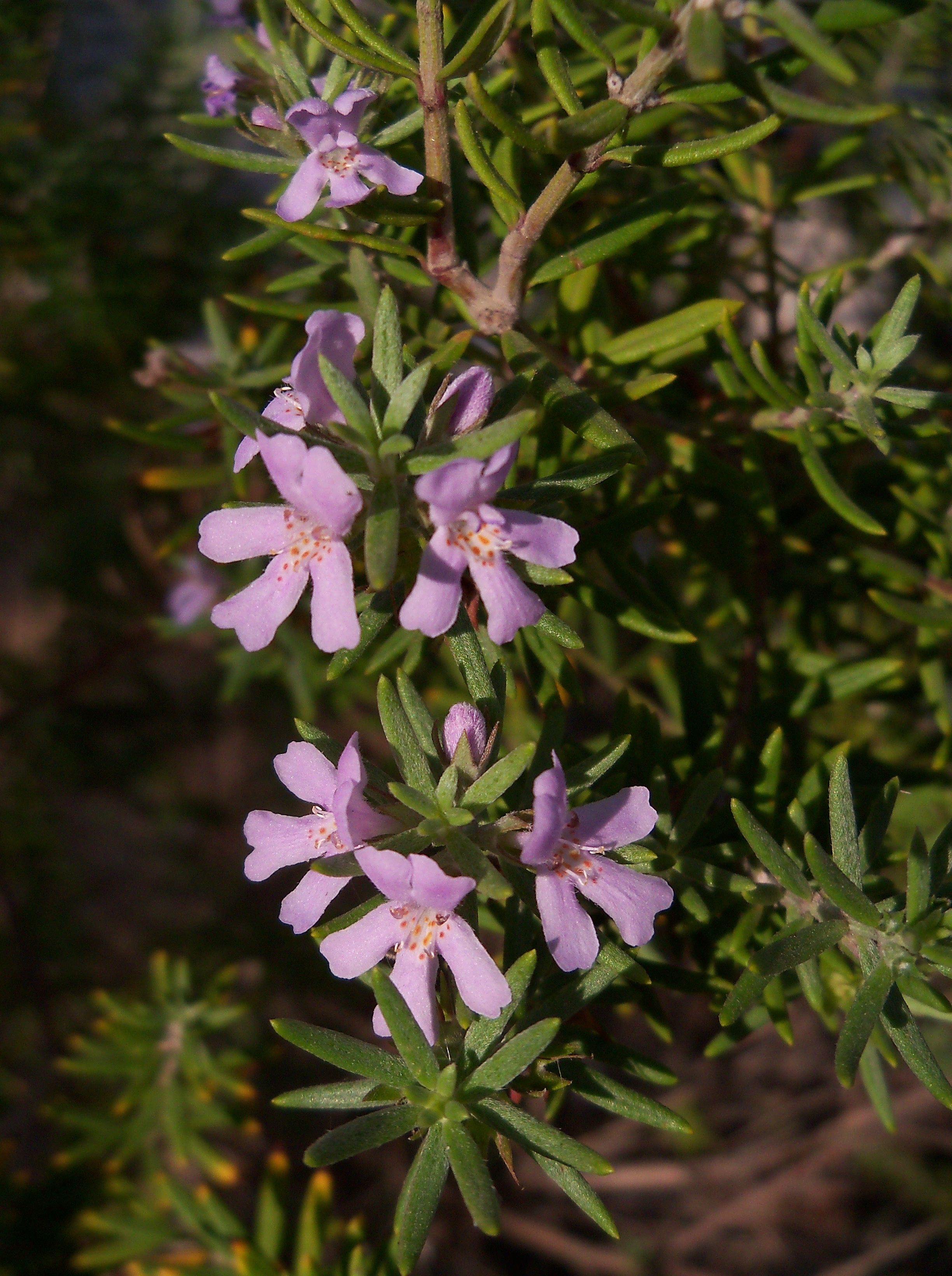 Westringia eremicola (Romero de Australia) - Inflorescencia. - Cultivado/ornamental, Paseo de la Constitución, Águilas, Provincia de Murcia (España).